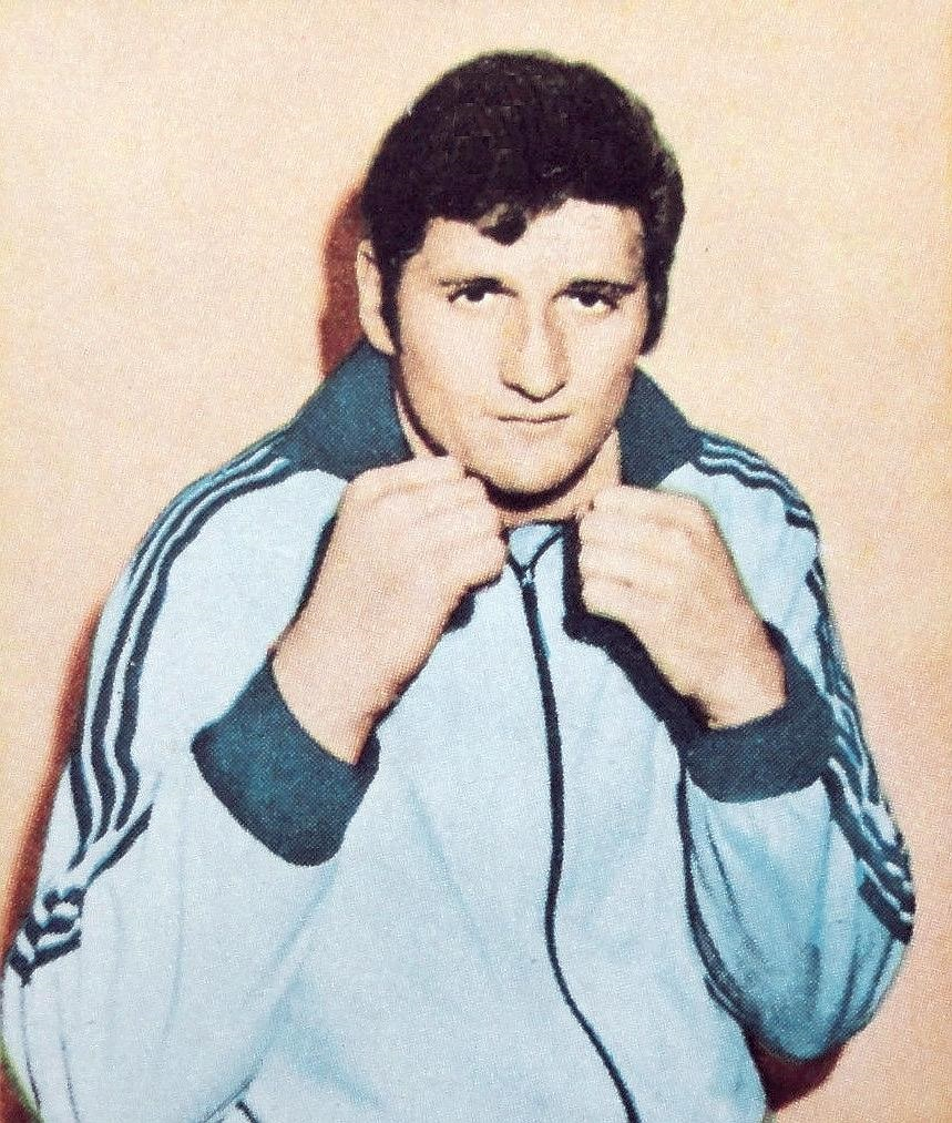 MUNCHEN 72-Figurina-Stickers-Panini-N° 29-HUSSING-BOXE-BDR-recuperata